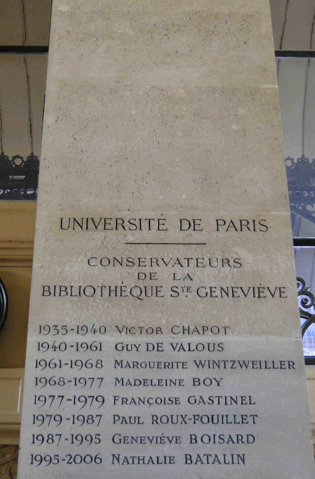 Liste des administrateurs et directeurs de la Bibliothèque Sainte-Geneviève après son changement de statut dans les années trente, palier de l'escalier d'honneur.